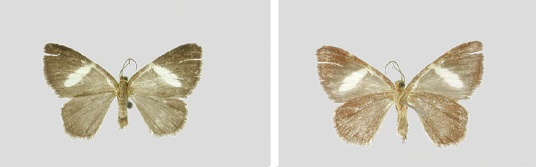 Hagnagora guatica